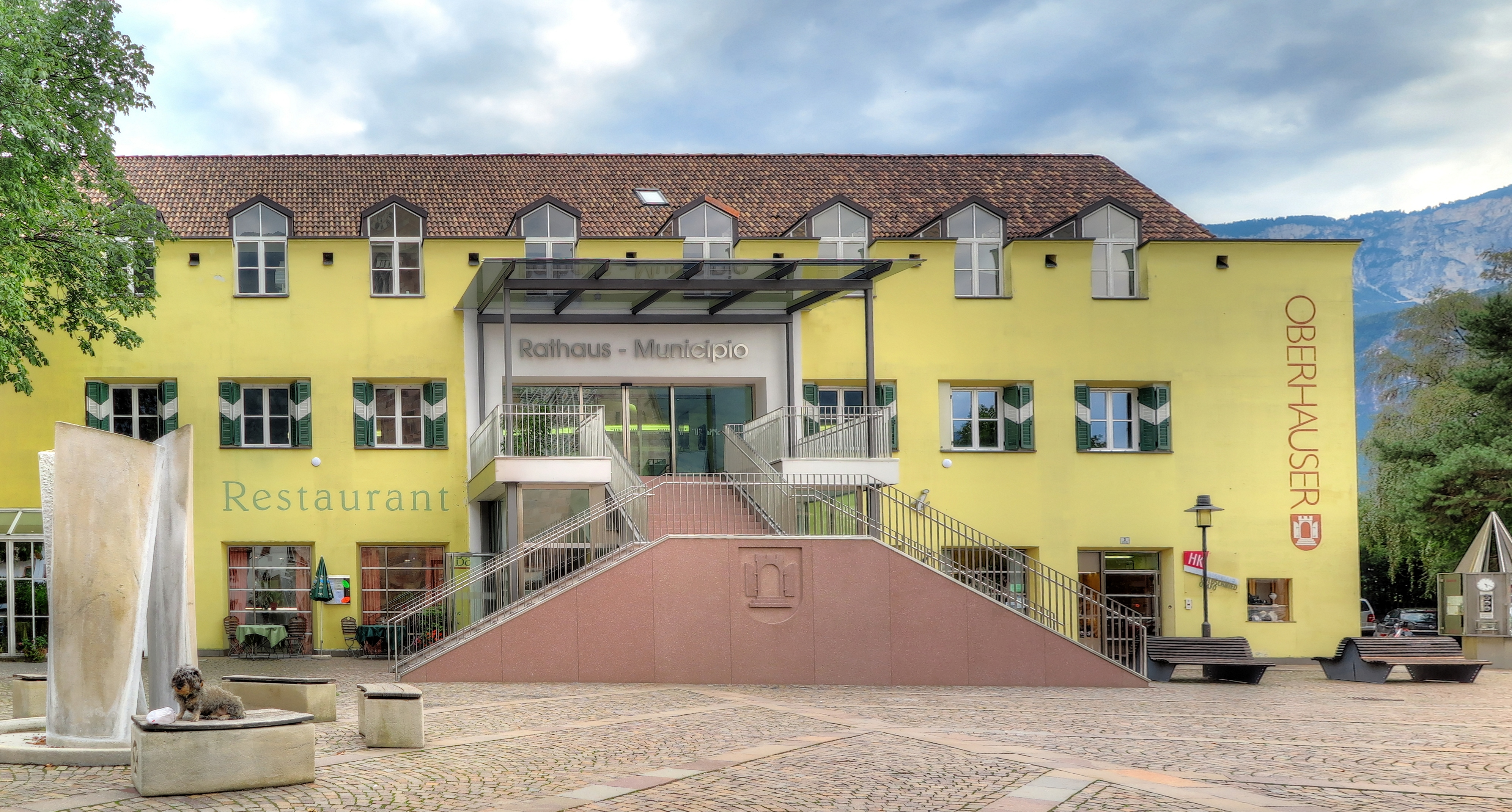 Italien, Südtirol, Terlan, Rathaus mit Brunnen